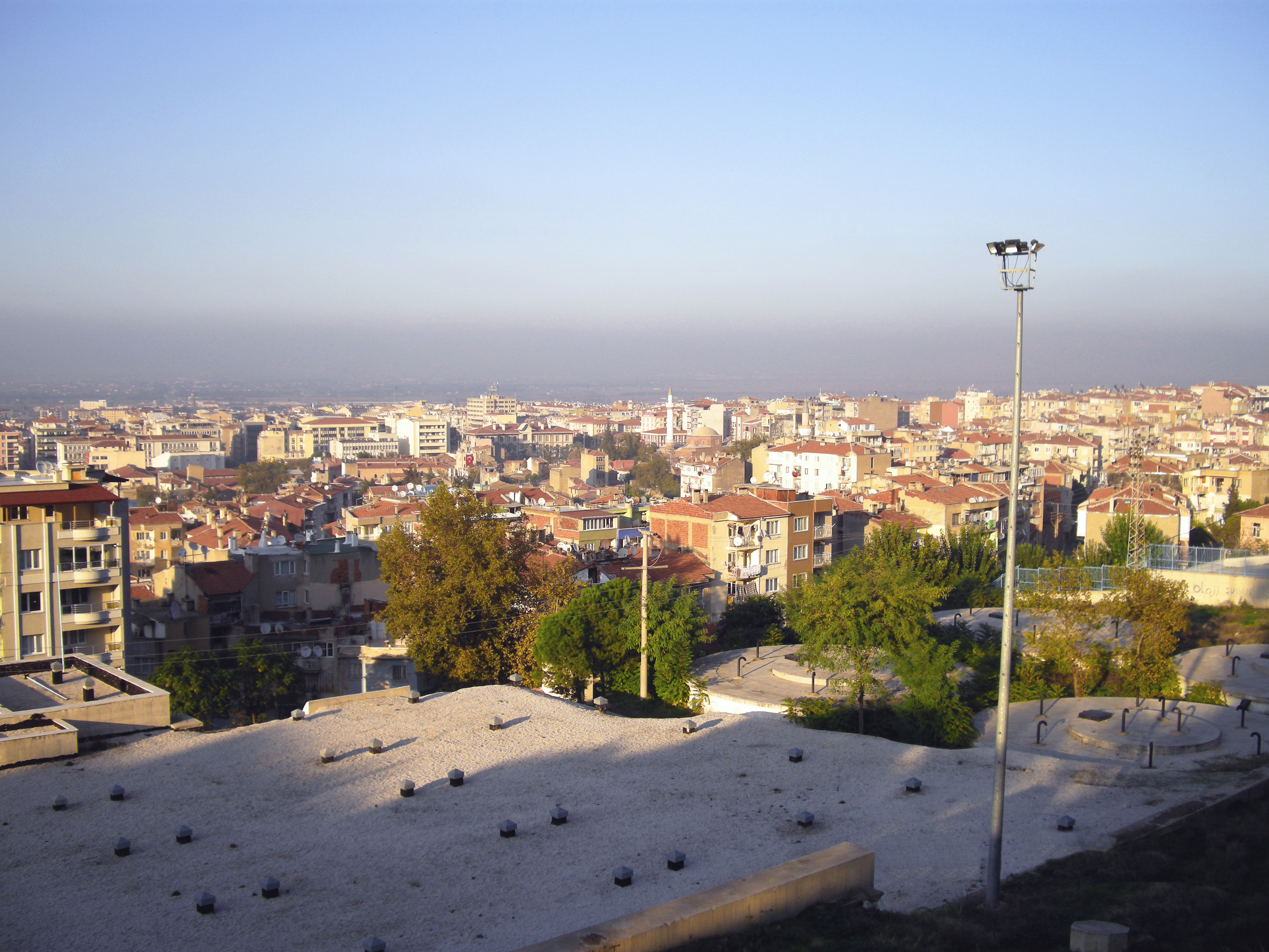 Ulu Cami önünden Manisa'nın görünüşü